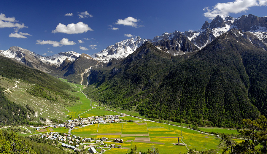 Vallée de Ceillac au printemps